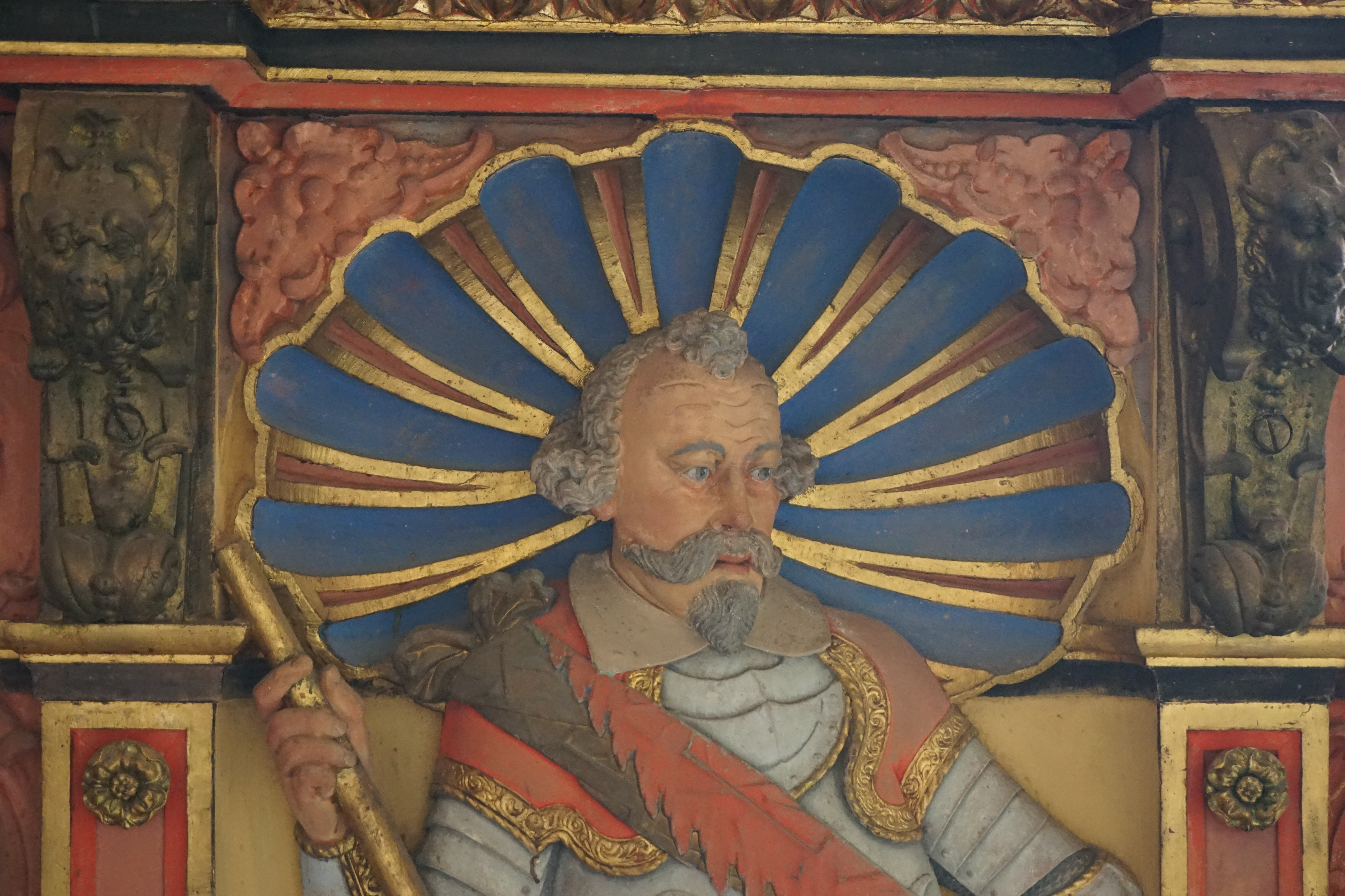 Epitaph mit der Darstellung des Röttler Landvogts Christoph Daniel von Anweil in der Kirche von Rötteln - Ausschnitt mit Kopf